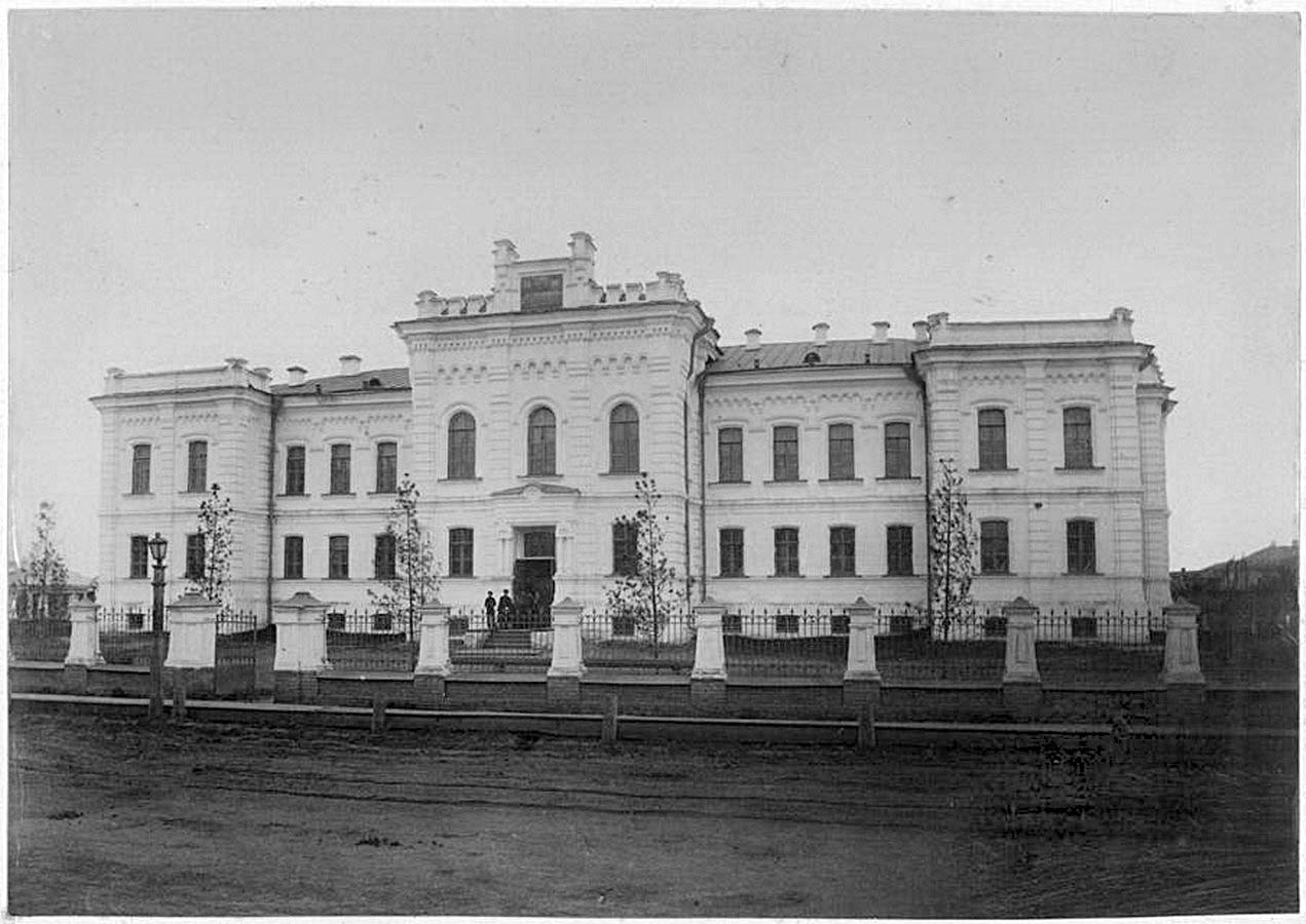 Здание тюменского Александровского реального училища